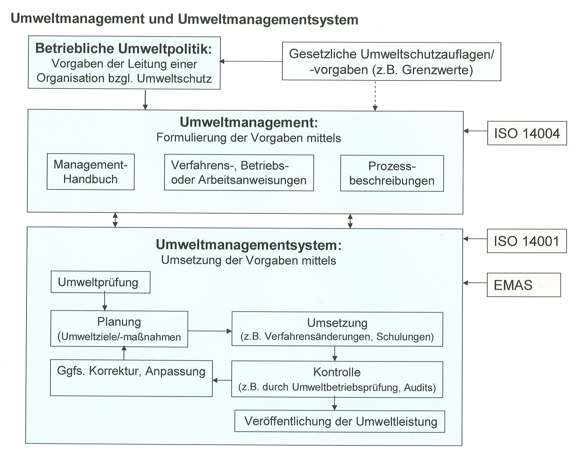 Zusammenwirken von Umweltmanagement und Umweltmanagementsystem